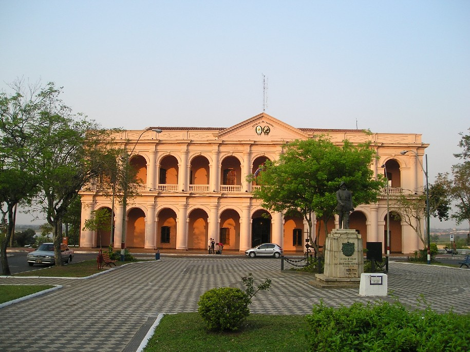 Asunción. Ex Cabildo, Ex Parlamento y actual Centro Cultural de la República. Plaza de la Independencia